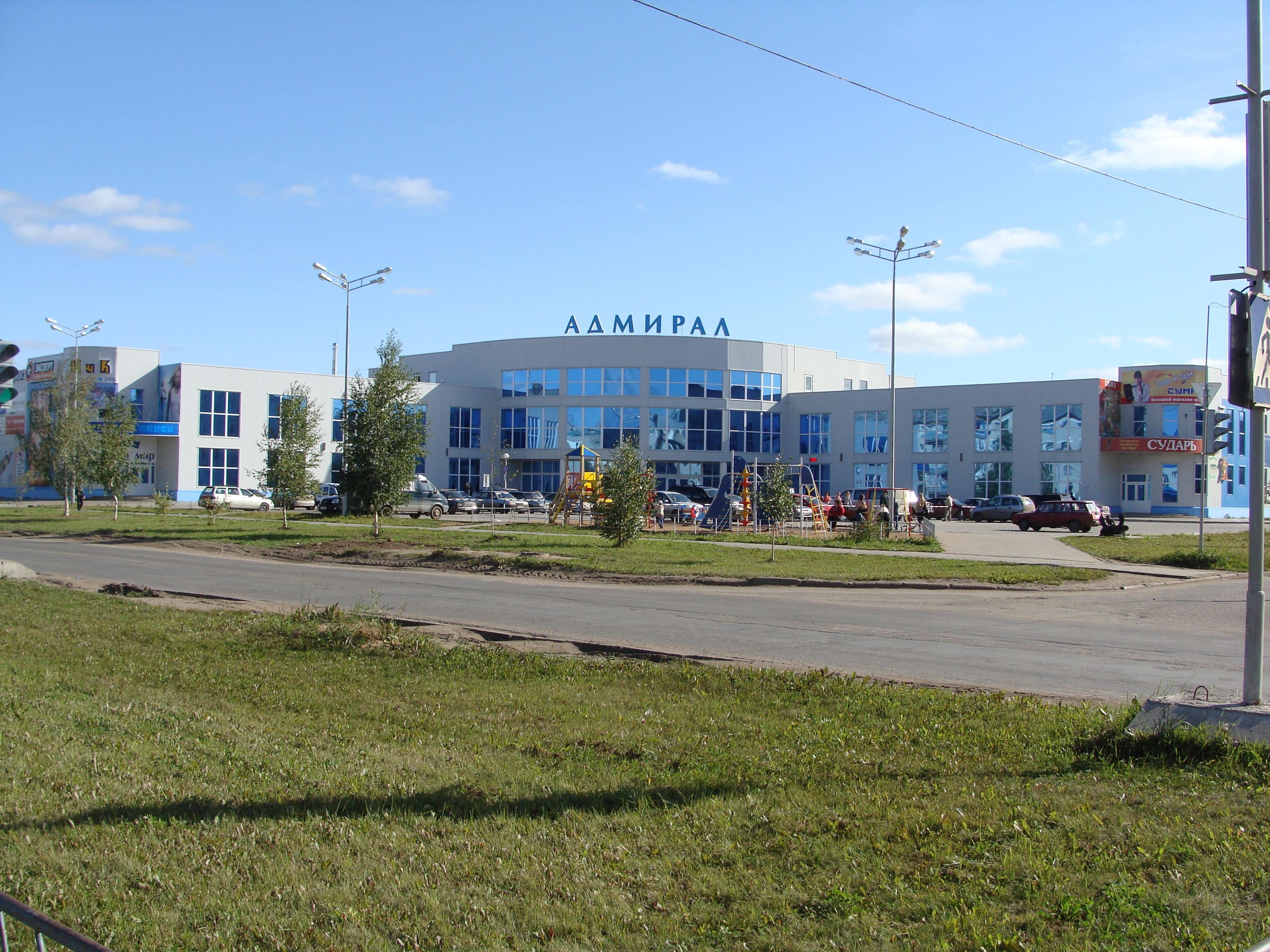 Торговый центр Адмирал г. Котлас